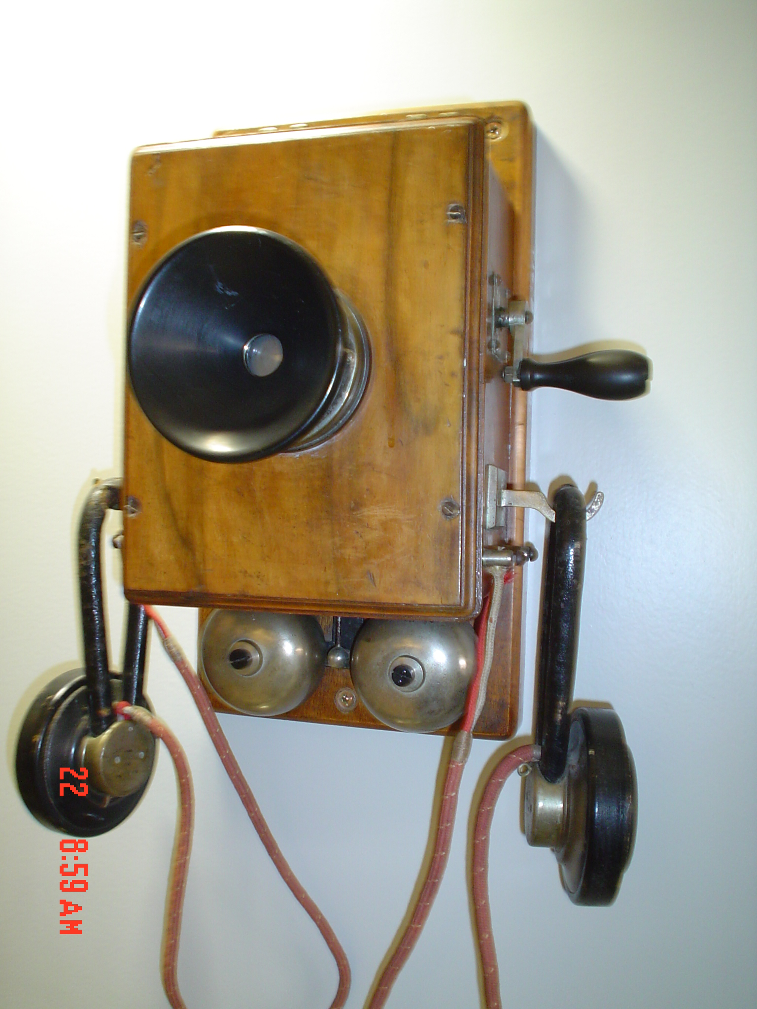 Fali fadobozos telefon (Telefónia múzeum, Budapest)